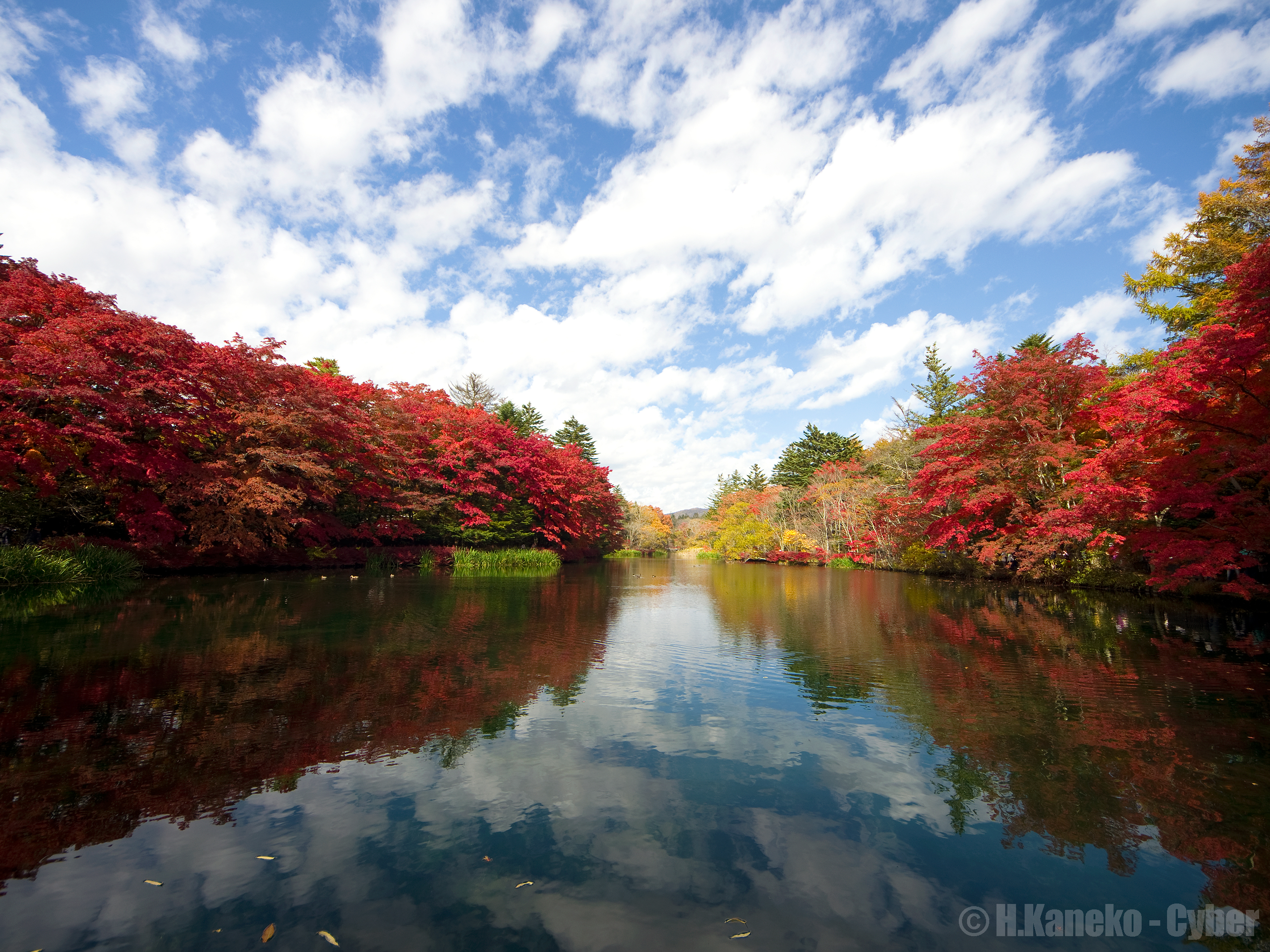 紅葉の雲場池 (Kumobaike pond in autumn) 26 Oct, 2014